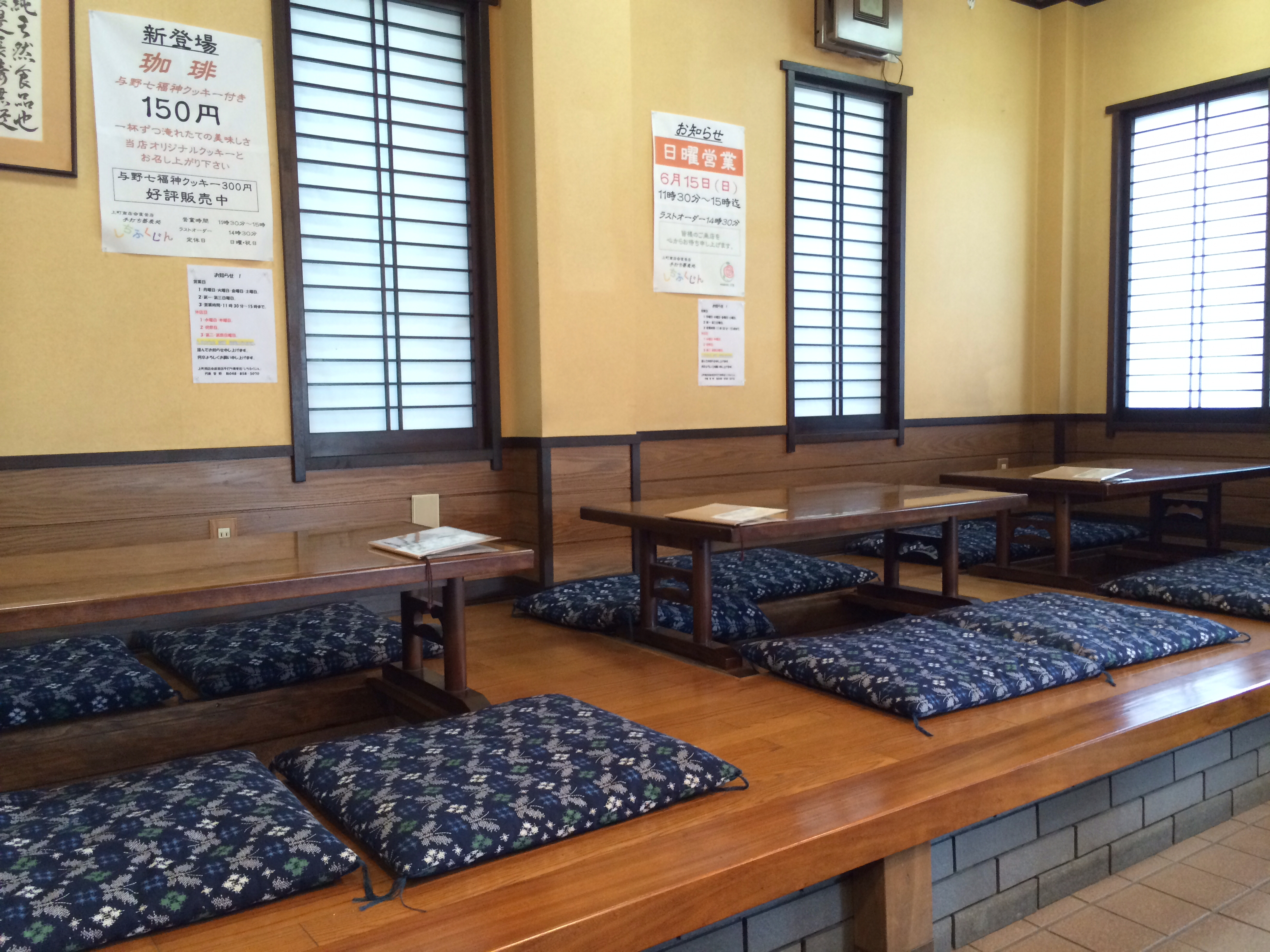 カメラロール-8318